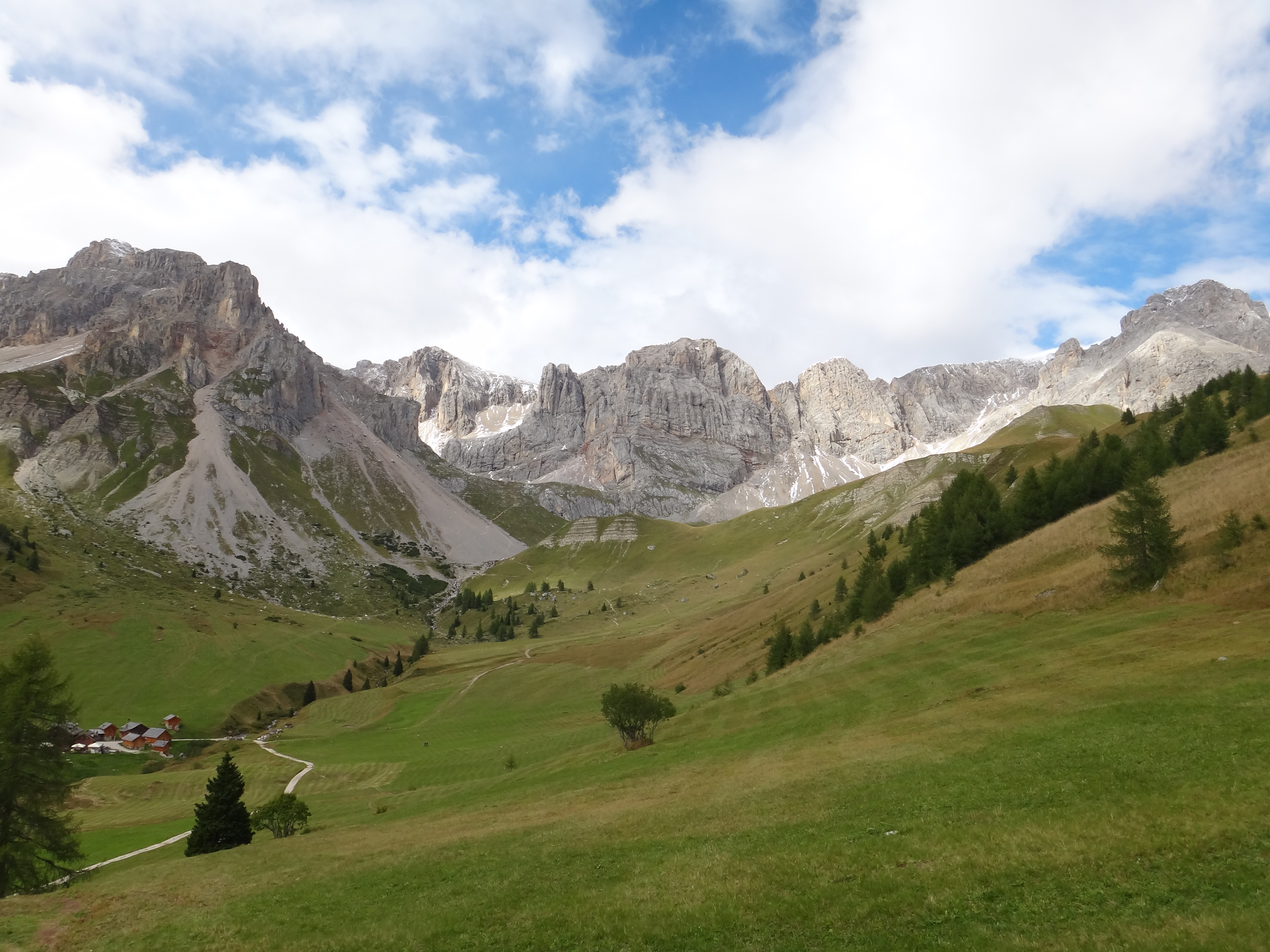 Dolomites - Alta Via 2: Stage 05-11 Rifugio Castiglioni to Rifugio Passo di Valles